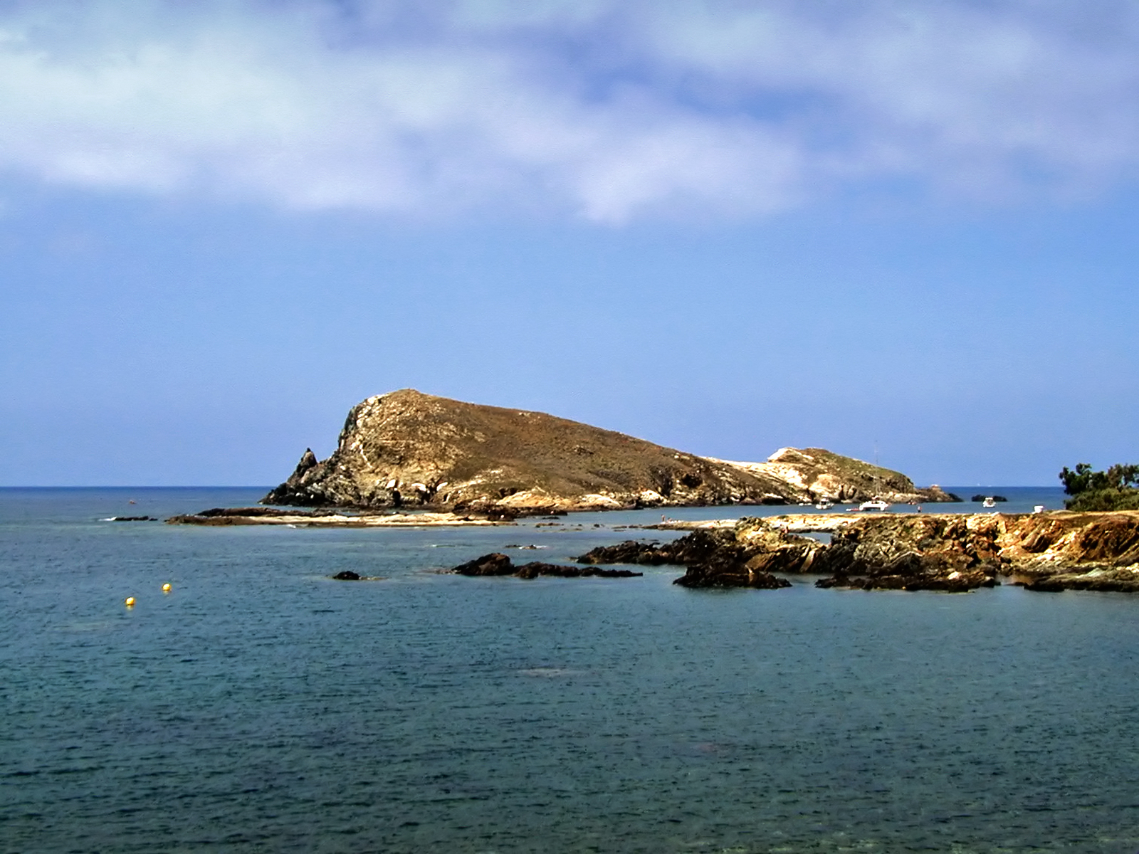 Centuri (Haute-Corse) - Île de Capense